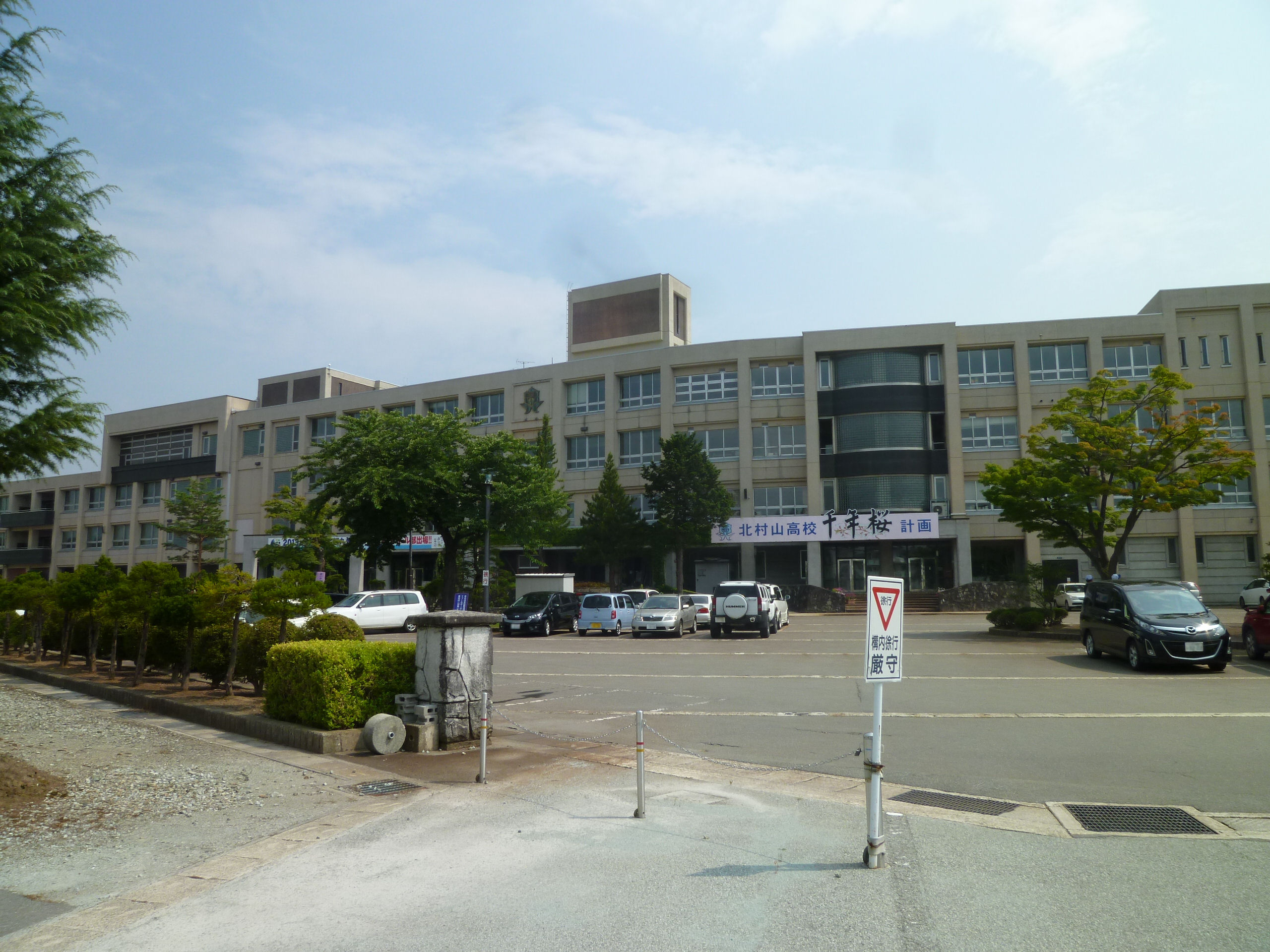 山形県立北村山高等学校。山形県尾花沢市尾花沢に所在。